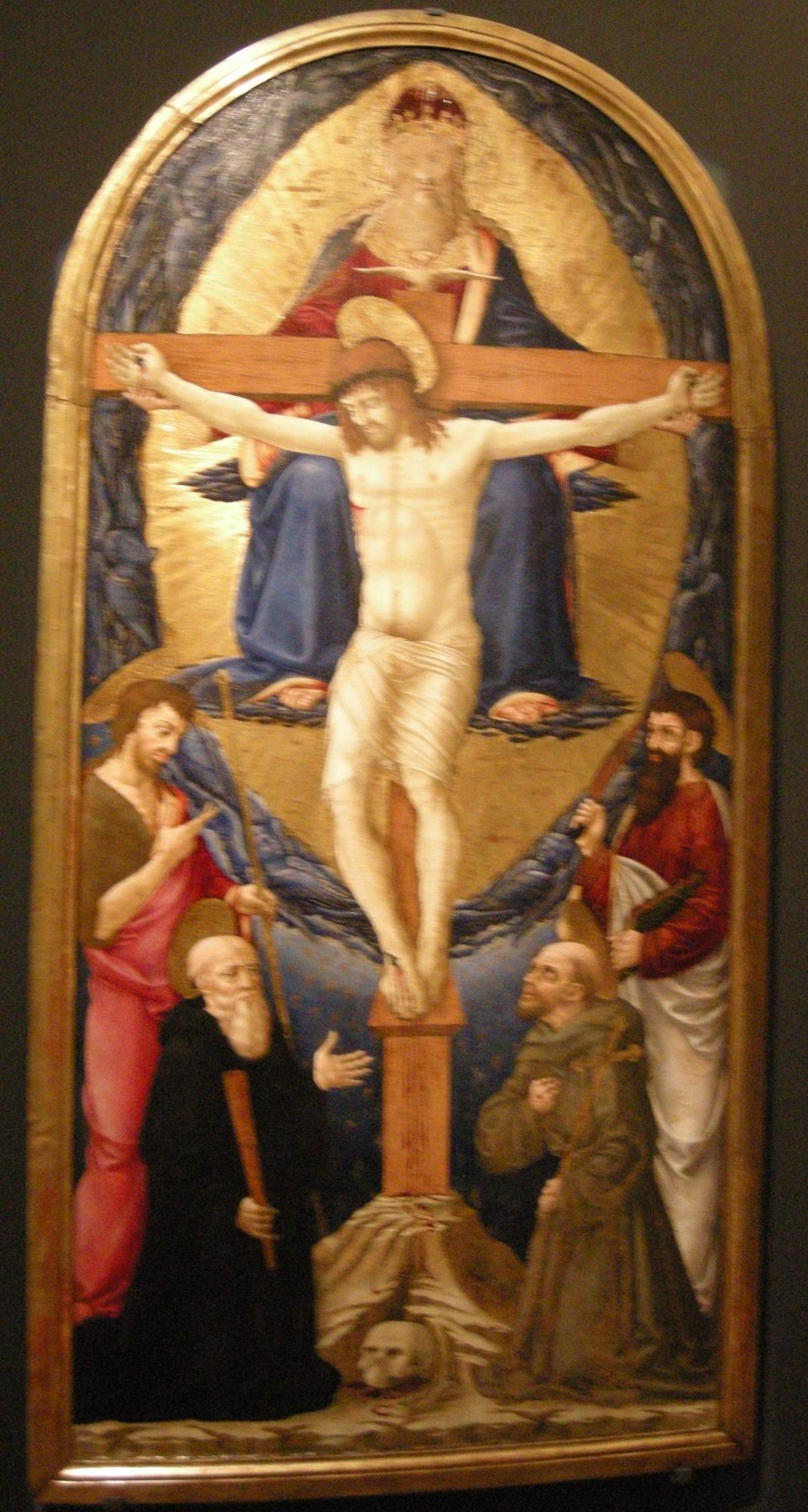 Neri di bicci, trinità tra i santi benedetto, francesco, bartolomeo e giovanni battista